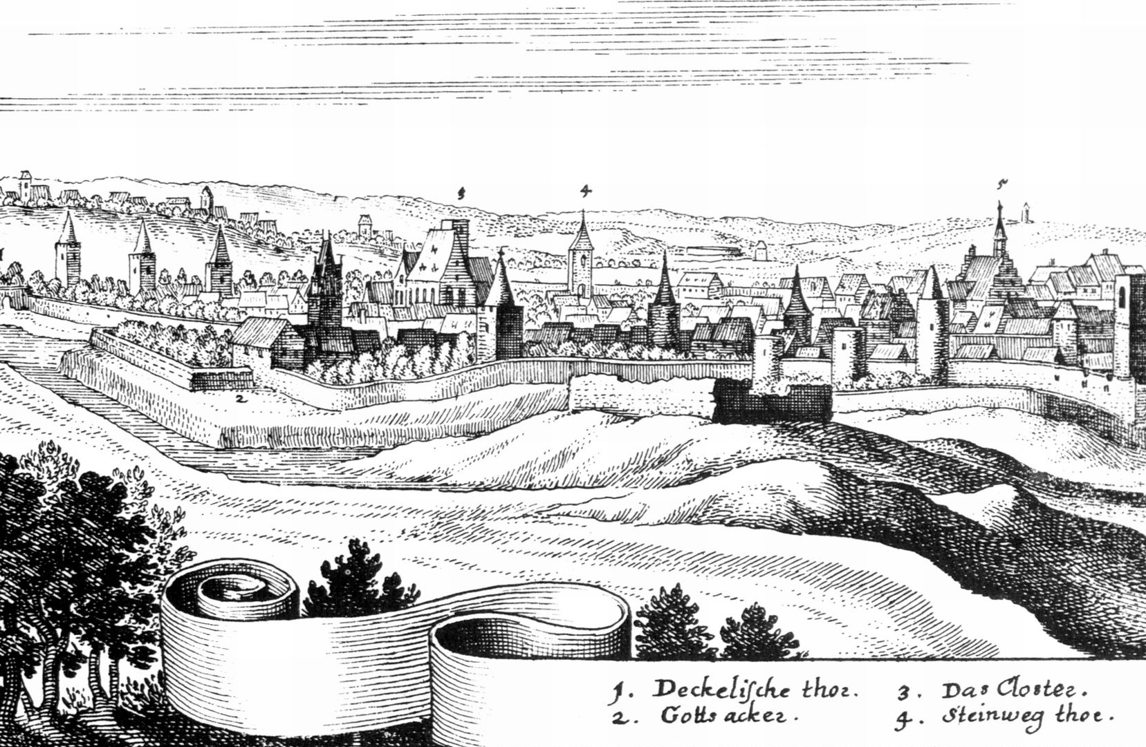 Matthäus Merian, Ansicht von Querfurt (1650), nördlicher Teil